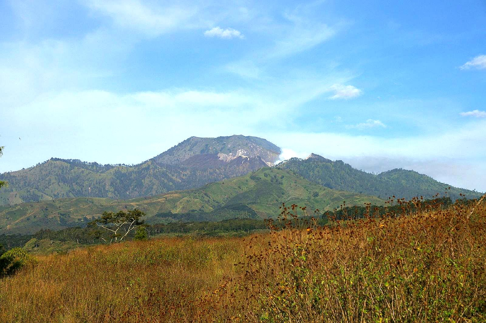 Blick vom oberen Ijen-Plateau nach Osten. Dampfwolken steigen aus dem Kawah Ijen, der im Hintergrund vom erloschenen Gunung Merapi überragt wird.